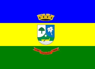 Bandeira da cidade de Taquari - RS - Brasil.